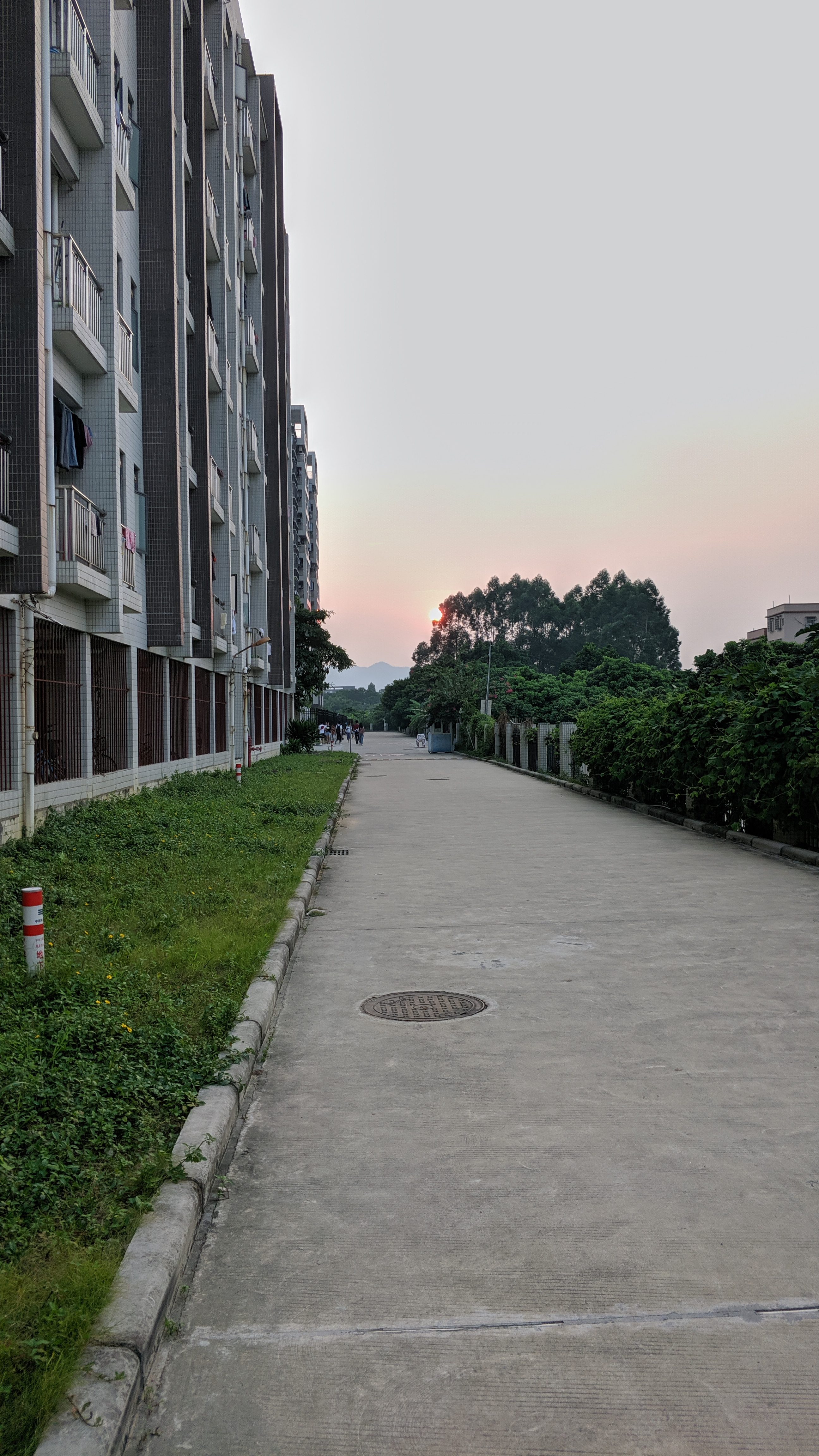 广东第二师范学院花都校区后端黄昏景色